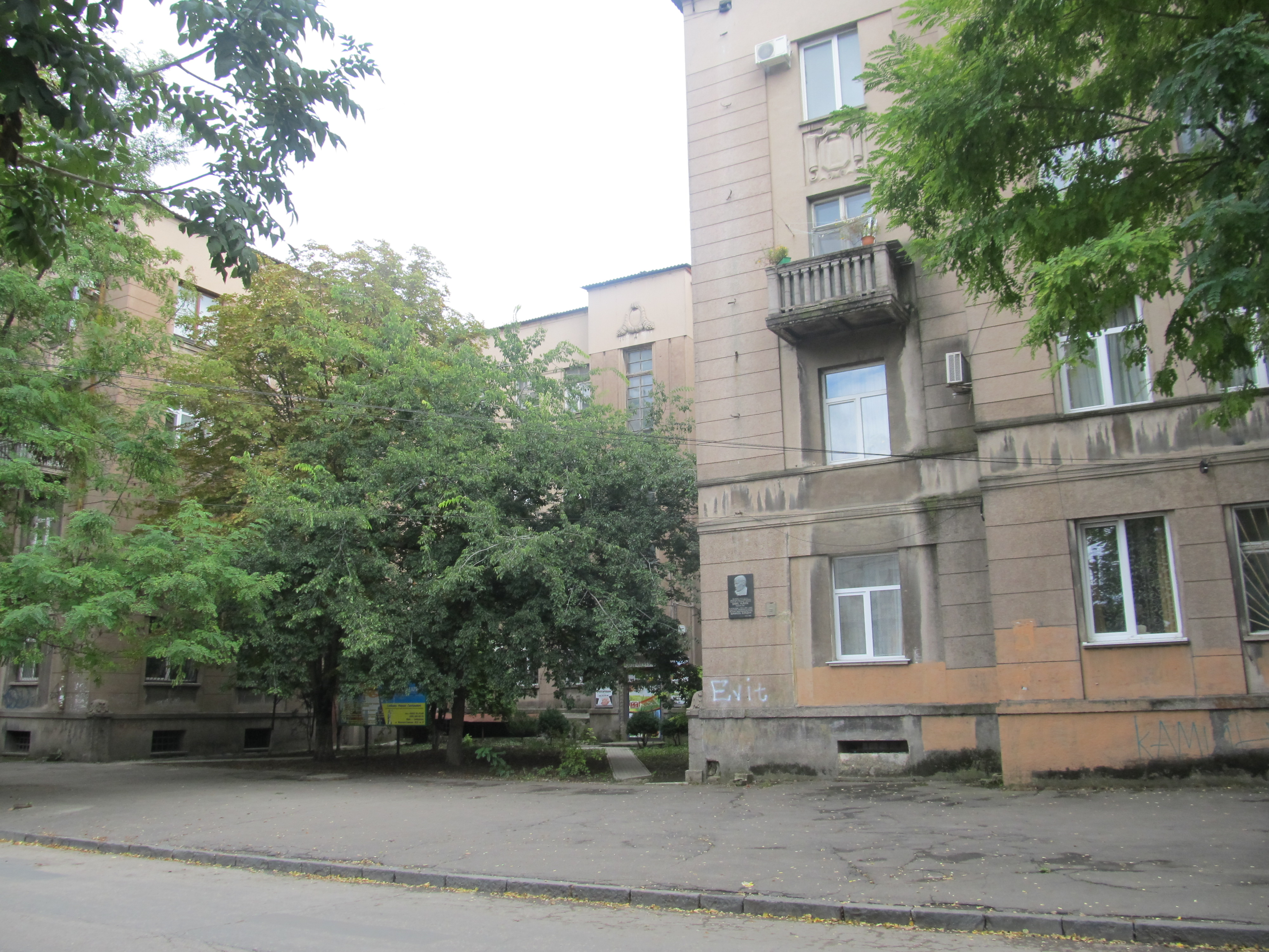 Жил Шамиль Алядин. Жуковского, 20. Симферополь.